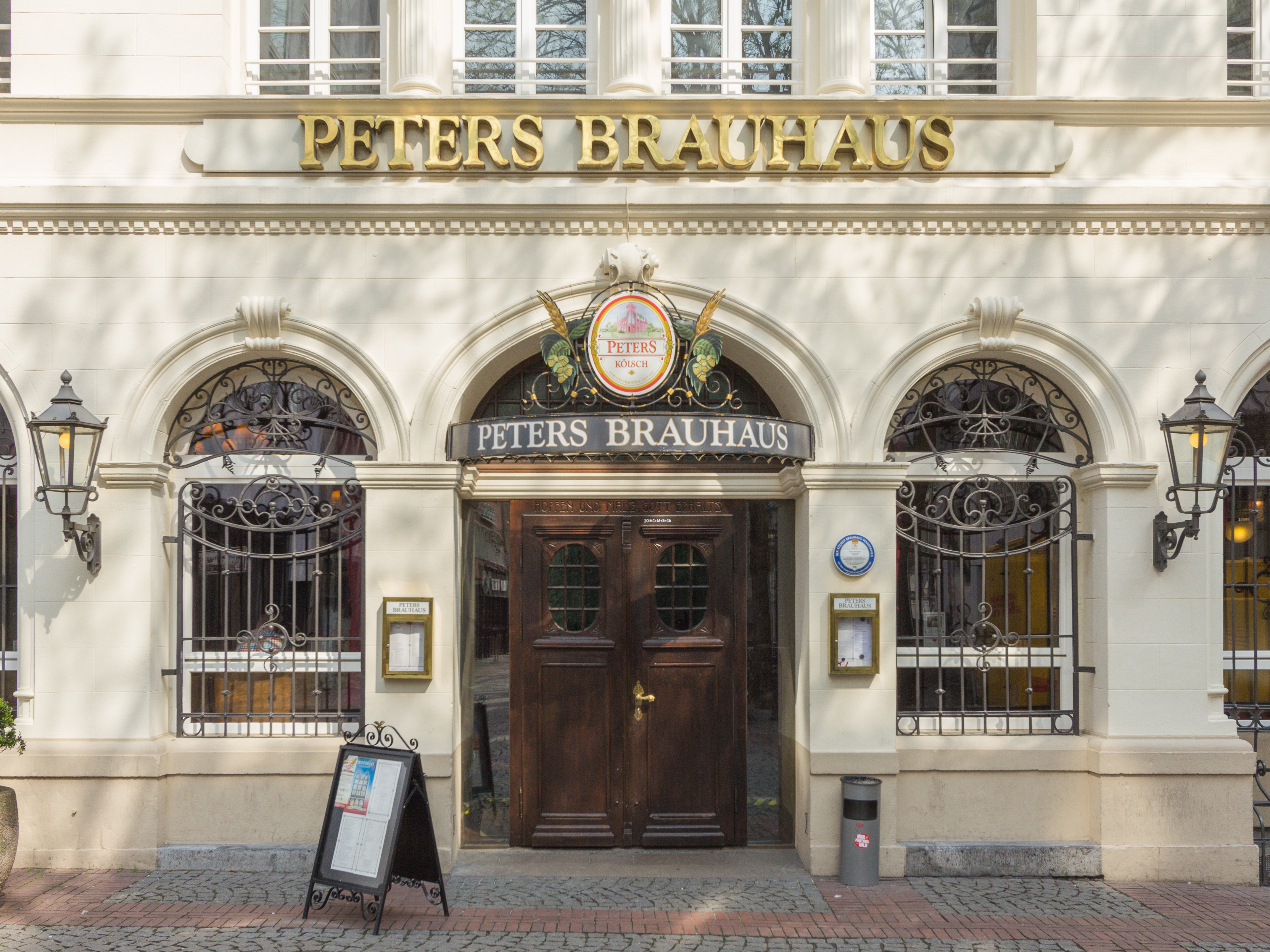 Denkmalgeschützte Vorderfassade von Peters Brauhaus, Köln